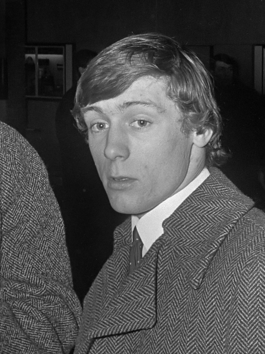 Glasgow Rangers in Hiltonhotel te Amsterdam Martin (links) en Johnston 14 januari 1969